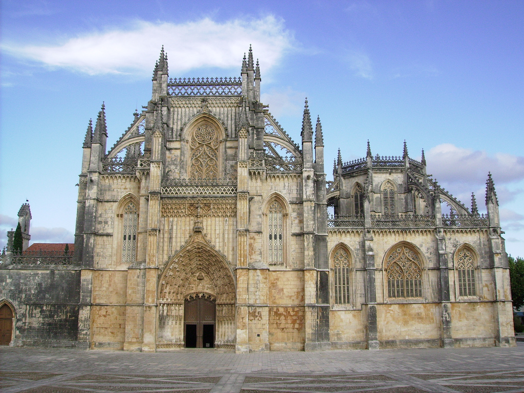 Façade of Batalha Monastery, Portugal